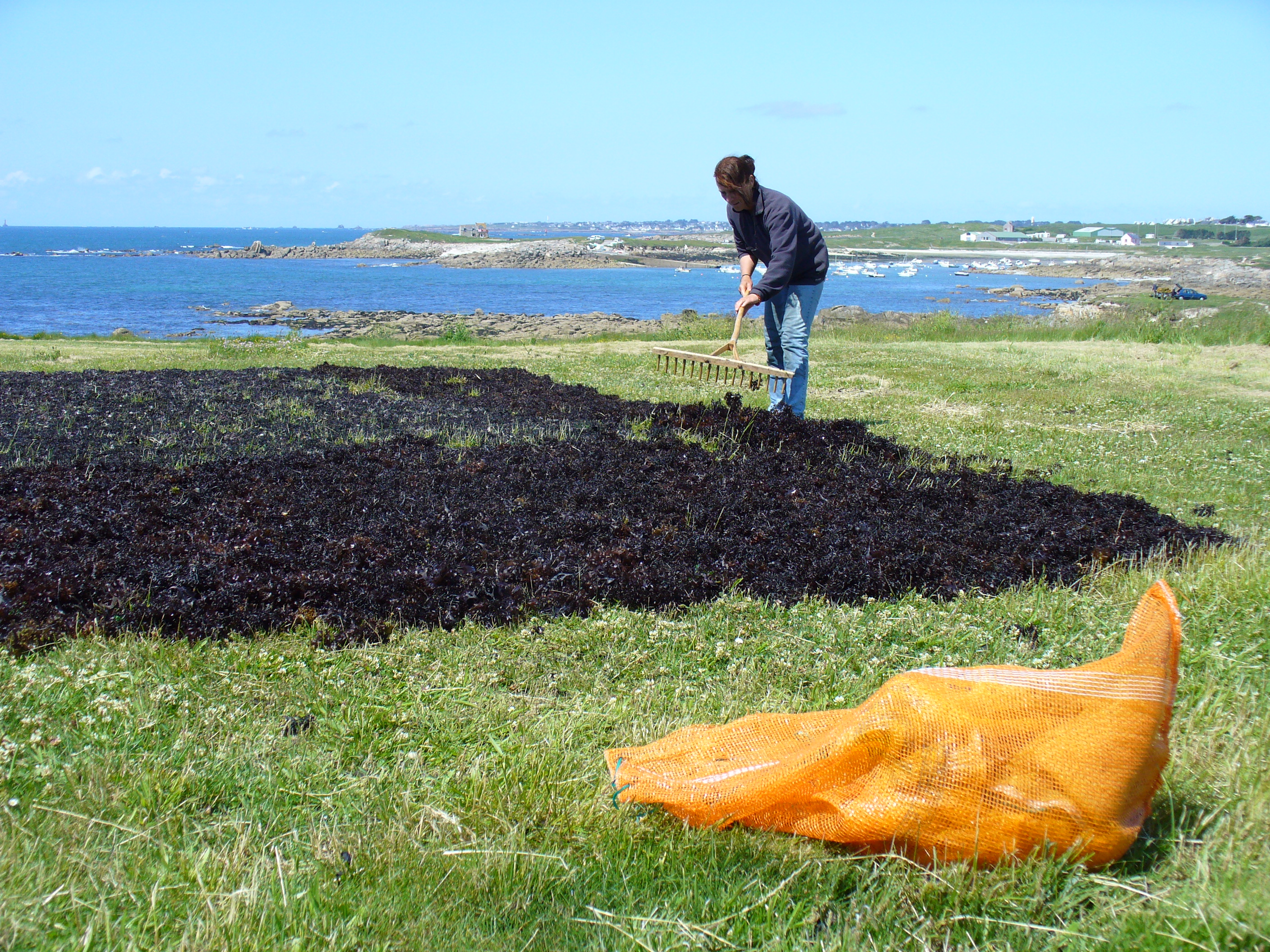 Récolte du goemon devant l'Ile Segal à plouarzel (29)